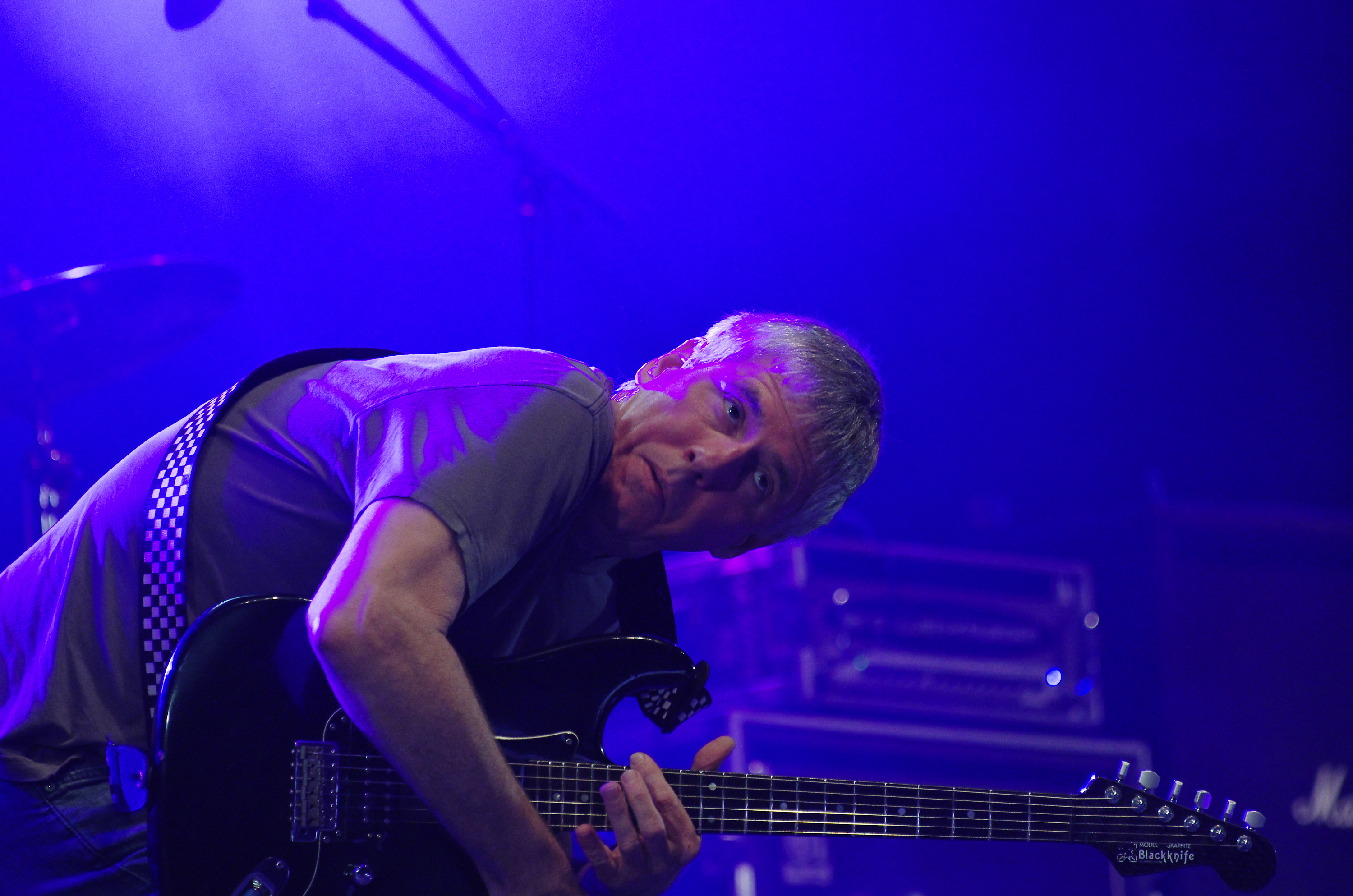 Black Flag beim Ruhrpott Rodeo 2013 in Hünxe. Besetzung: Dave Klein (Bass), Greg Ginn (guitar), Ron Reyes (voc), Gregory Moore (dr)